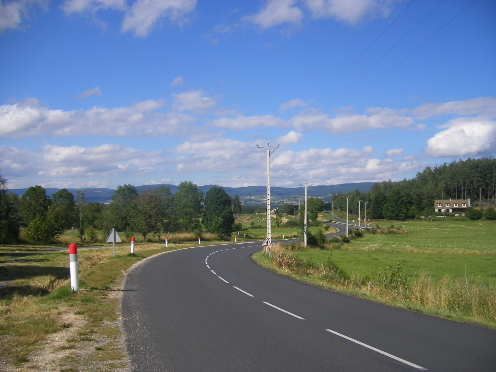 The D989 route between Le Malzieu-Ville and Saint-Chély-d´Apcher near Ortizet (commune Saint-Pierre-le-Vieux)